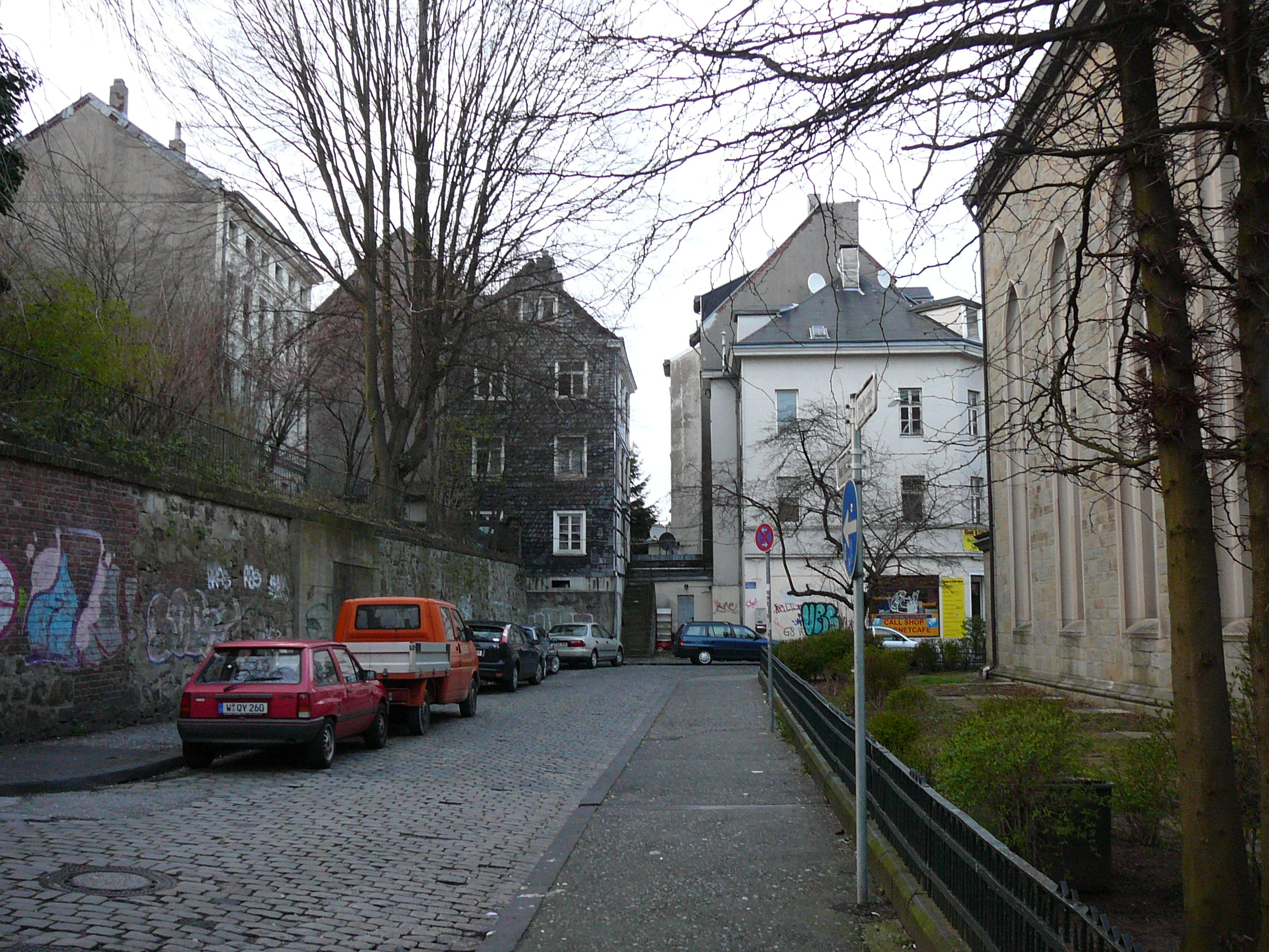 Neue Friedrichstraße, Wuppertal